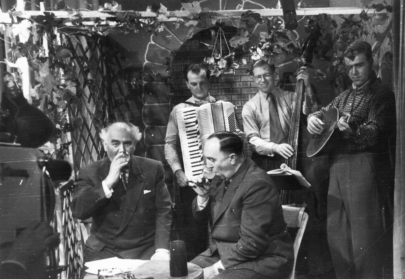 TELESAAR Fernsehproduktion. Das erste saarländische private Fernsehen überträgt das Kulturmagazin "Hüben und Drübern", moderiert von Josef Reichert.